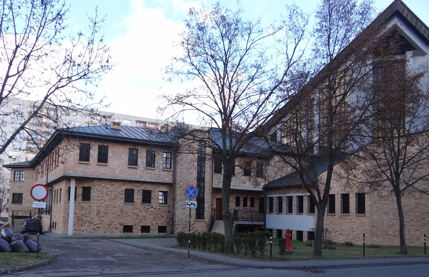 Stargard,2016 r. Plebania parafii Miłosierdzia Bożego